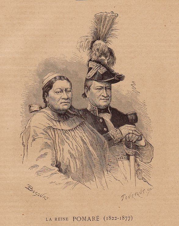 Pomare Vahine IV et son époux Ariifaite. Après avoir répudié son premier mari Tapoa, elle épousa son cousin germain en 1832. Celui-ci, qui n’avait aucune fonction officielle , se révéla un constant soutien et contribua au prestige du couple royal.